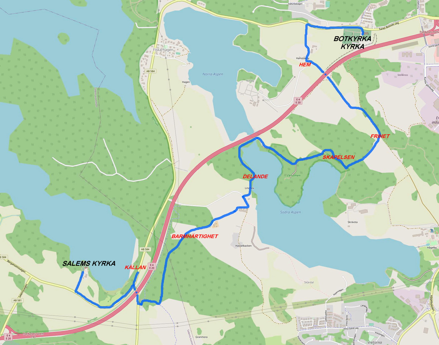 Sankt Botvids pilgrimsled Bakgrundskarta: Opens Street Map Förklaringar: Holger Ellgaard